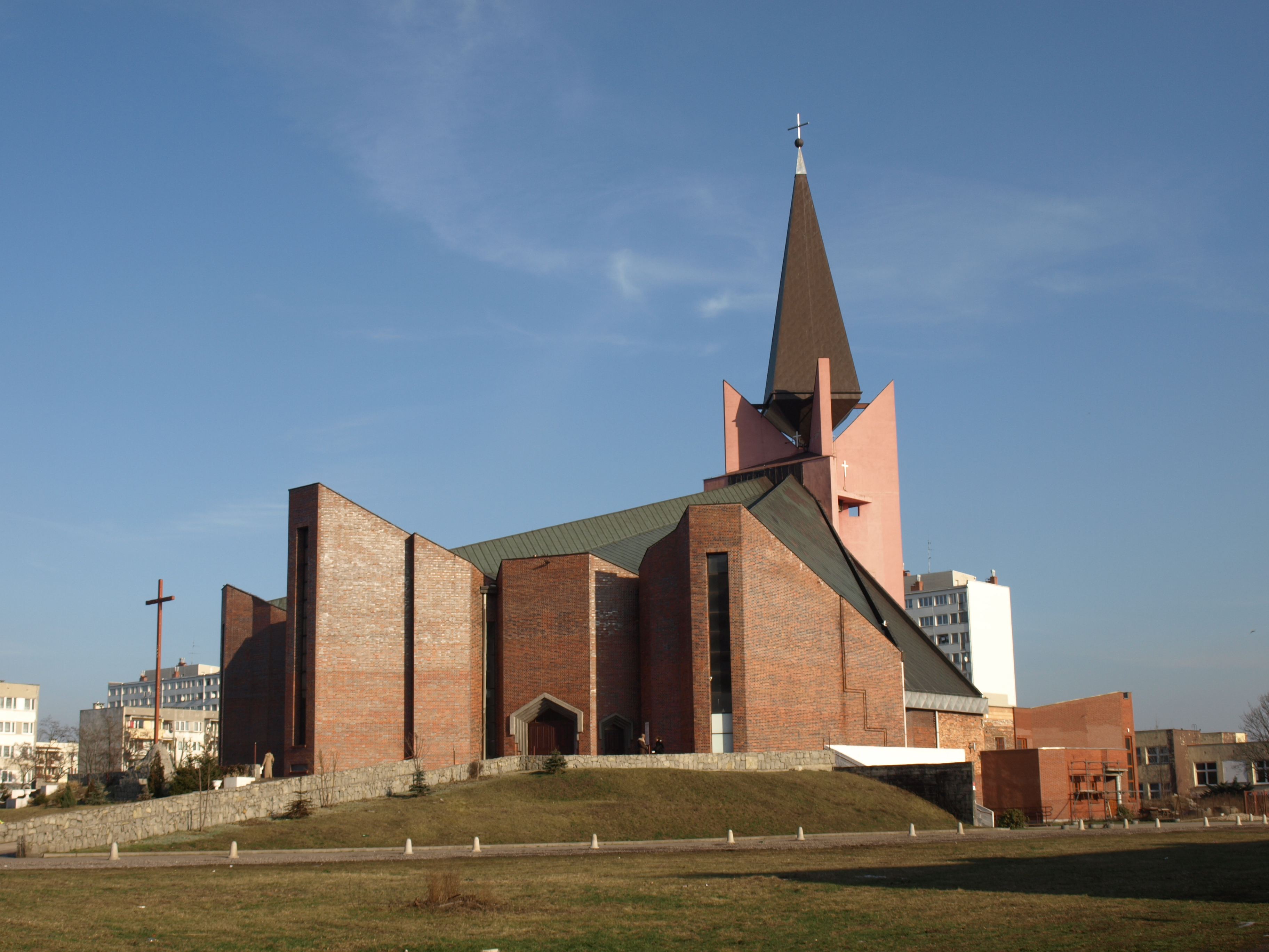 Kościół MBKP na legnickim osiedlu M. Kopernika